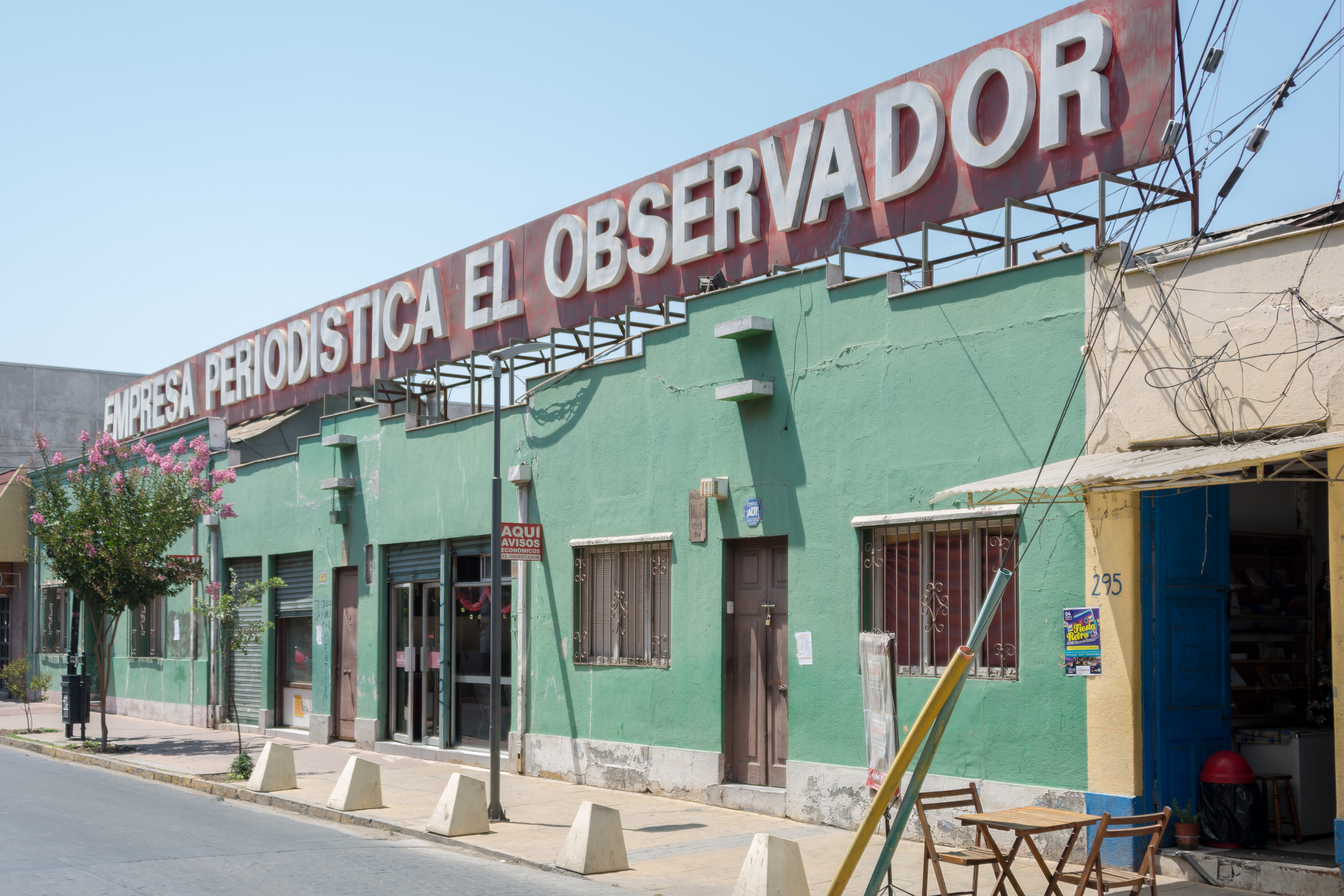 Sede El Observador, Quillota, Región de Valparaíso, Chile